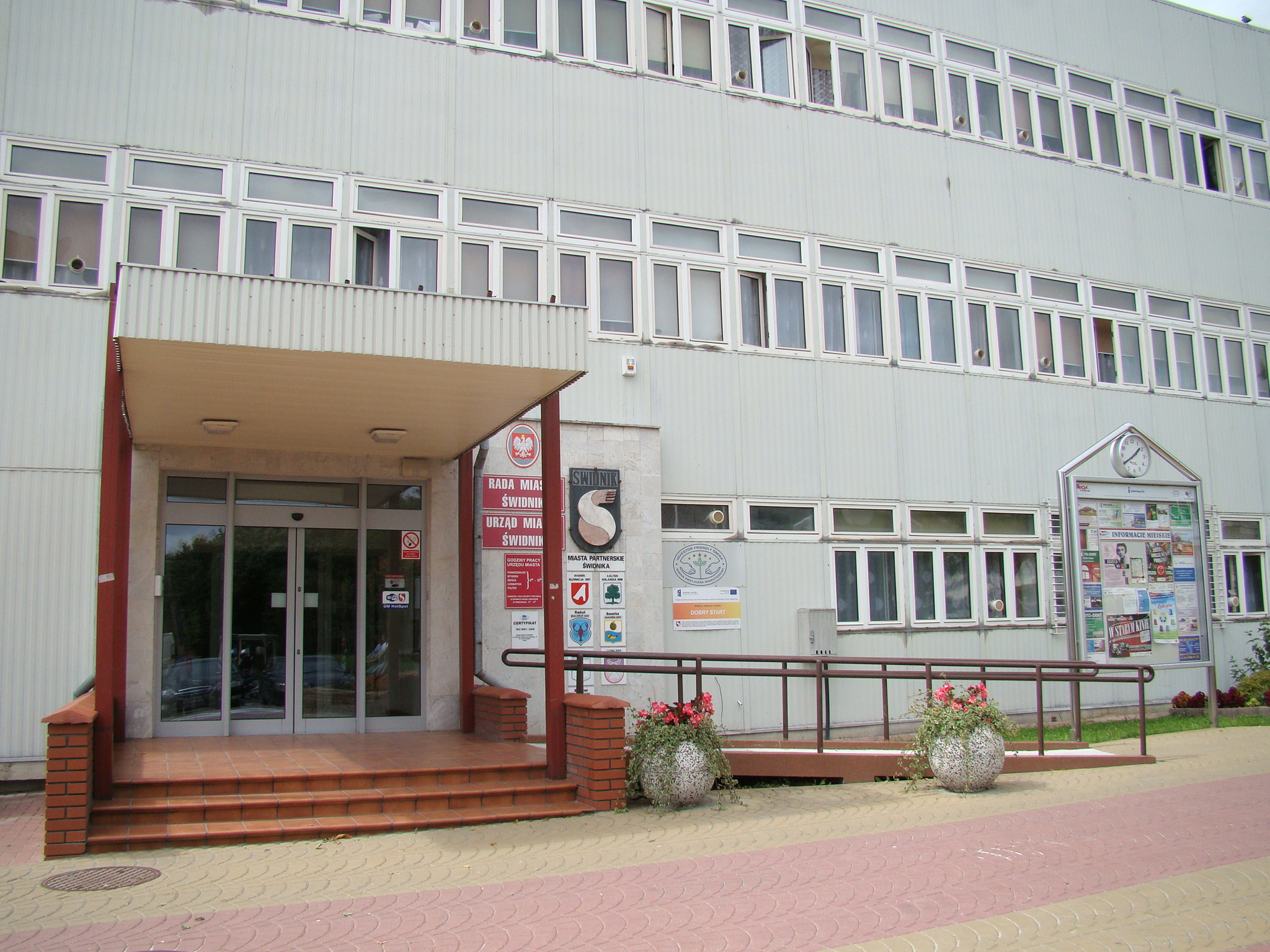 Urząd Miasta Świdnik